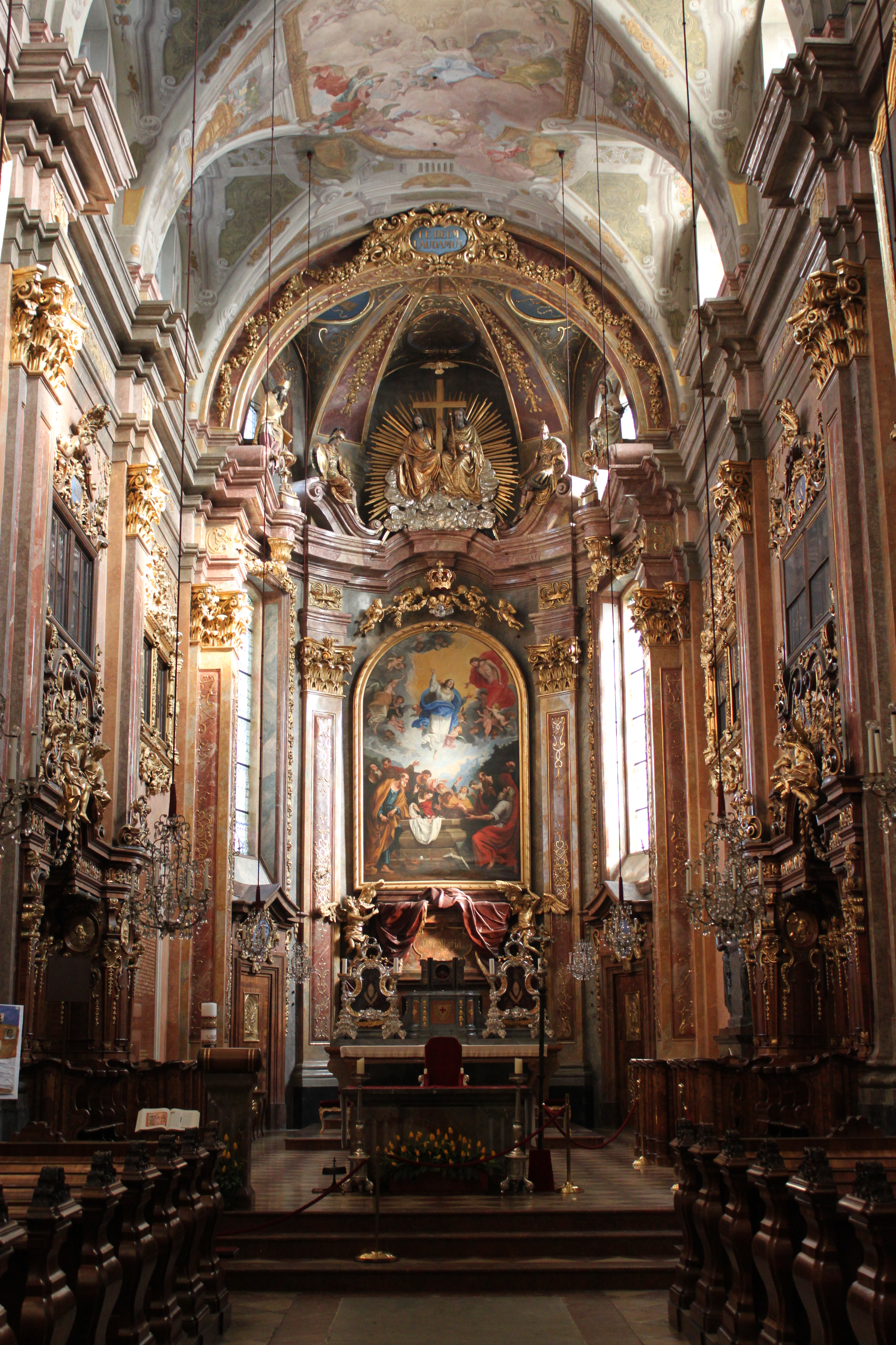 Apsis des St. Pöltner Doms